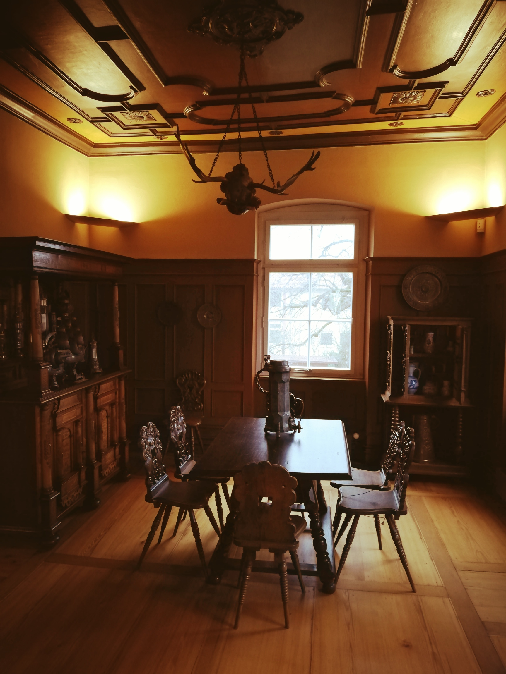 Weygang-Museum in Öhringen, Zimmer im Stil des Historismus